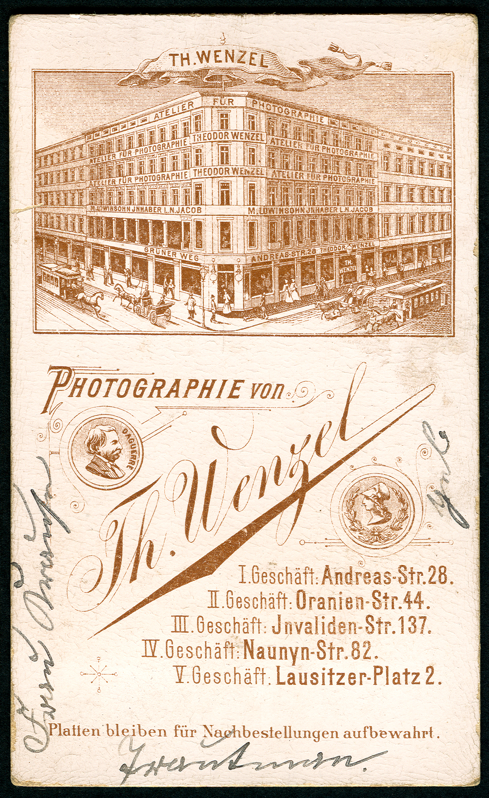 Diese Rückseite der Carte de Visite des Fotografen Theodor Wenzel gehört zu den attraktivsten Reverts von Fotografien auf Pappe des 19. Jahrhunderts: Sicherlich idealisiert dargestellt ist das "Atelier für Photographie" als "I. Geschäft" unter der Adresse Andreas-Straße 28/Ecke Grüner Weg, vor dem in beiden Richtungen Pferdestraßenbahnen und offene Kutschen fahren. Die Lithographie zeigt somit eine Ansicht vor 1900.